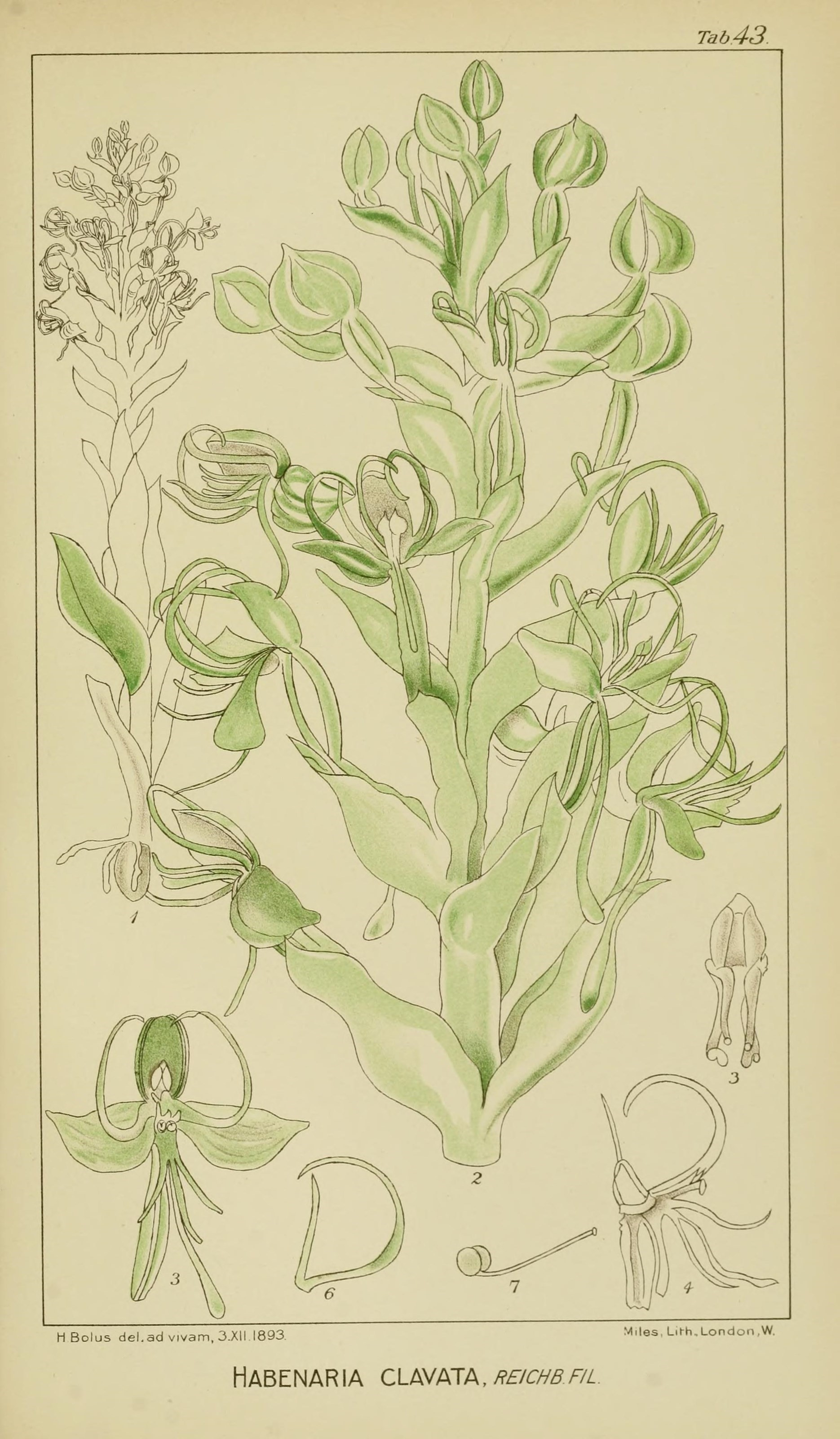 Tab43. H Bolus del.ad vivam,3.XII 1893. ■Iiles. Lil-h, London, W, H ABENAR I A CLAVATA , REICHB FIL